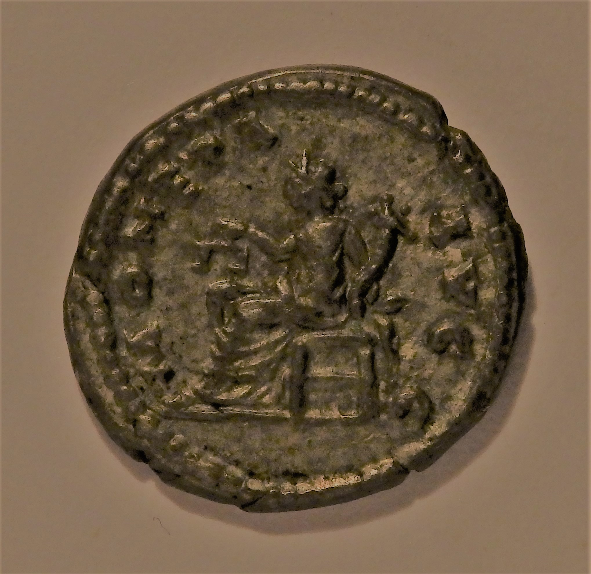 Moneta auf Rückseite eines Denars von Septimius Severus, Kampmann 49.114